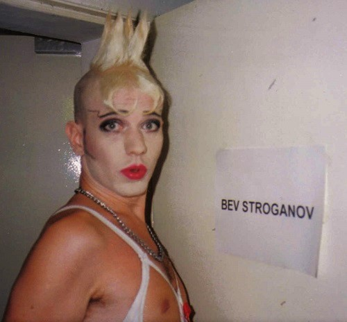 BeV StroganoV war Gast in der NDR Schmidt-Show 1993 zum Thema "Travestie"